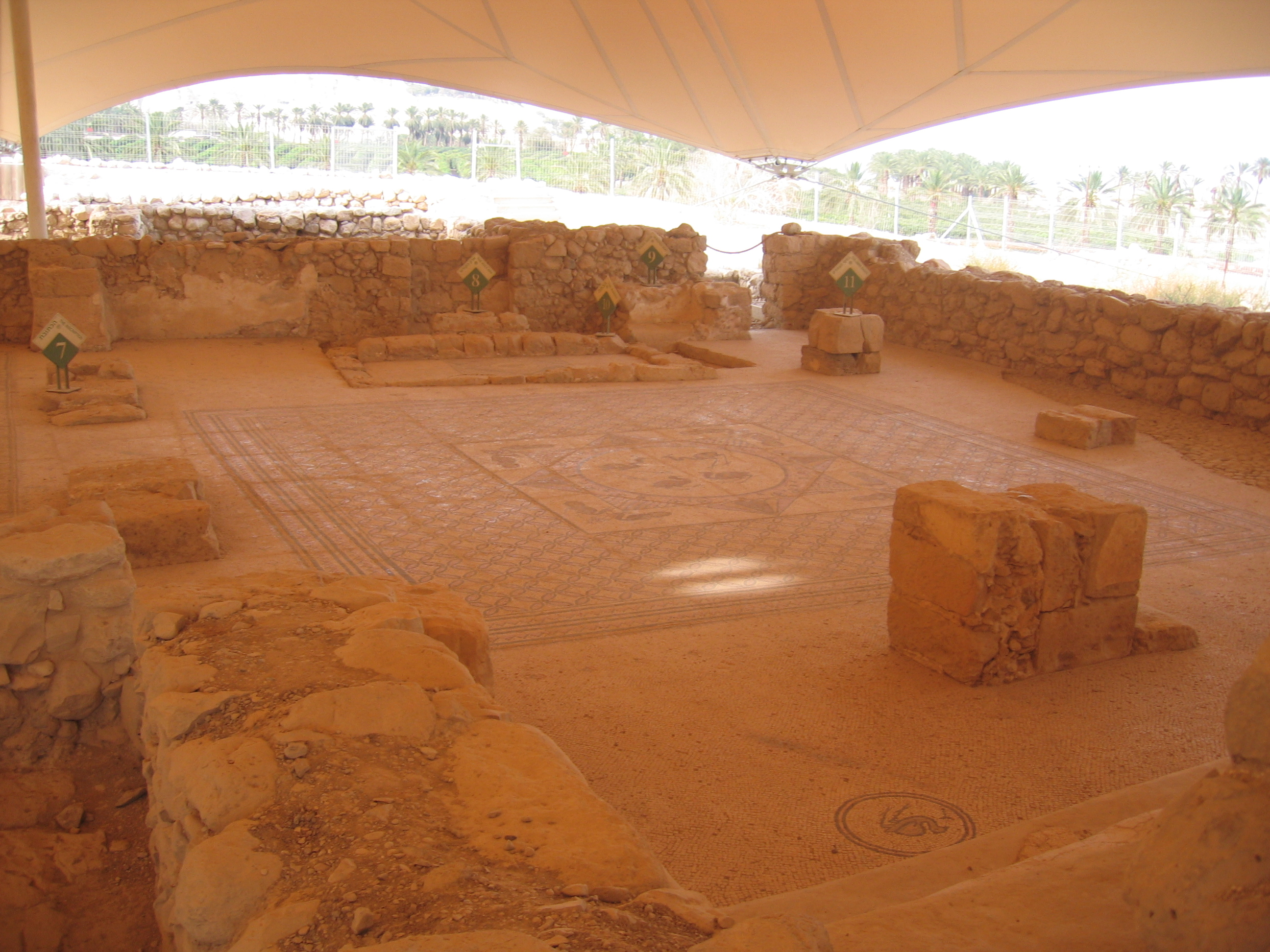 synagogue Ein Gedi Israel